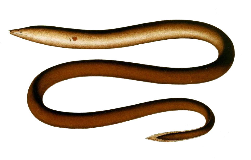 Moringua sp